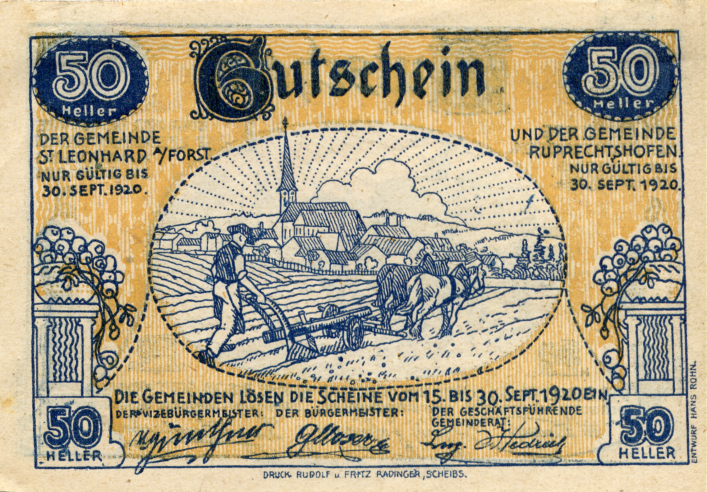 Notgeld, 1920, St.Leonhard und Ruprechtshofen